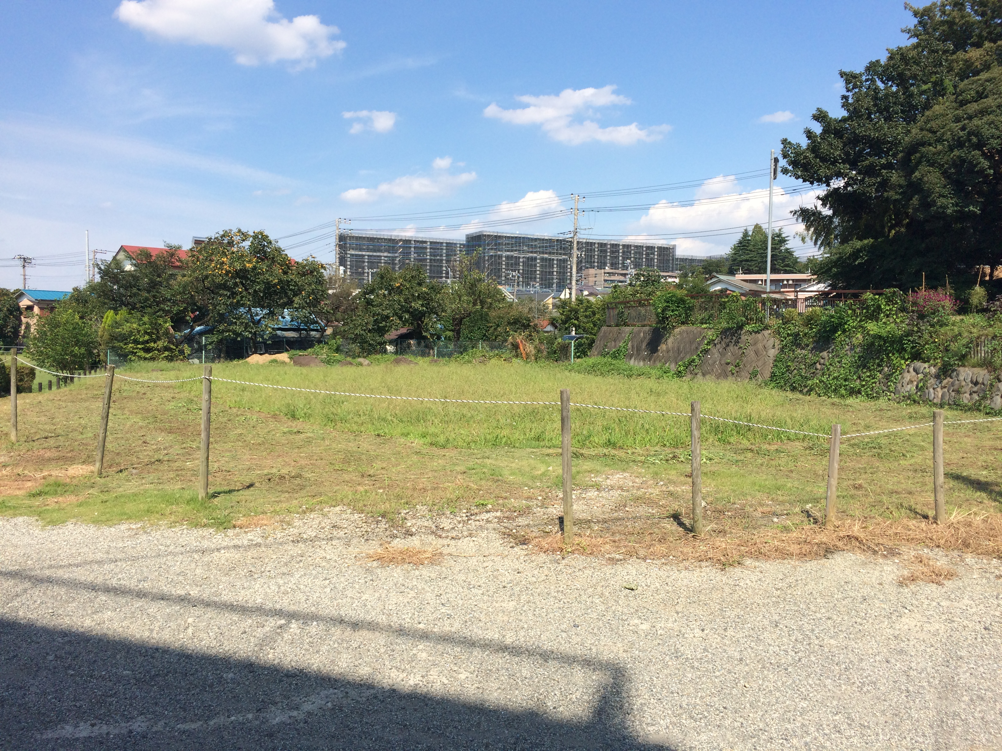 旧市立郷土資料館「海老名市温故館」の跡地